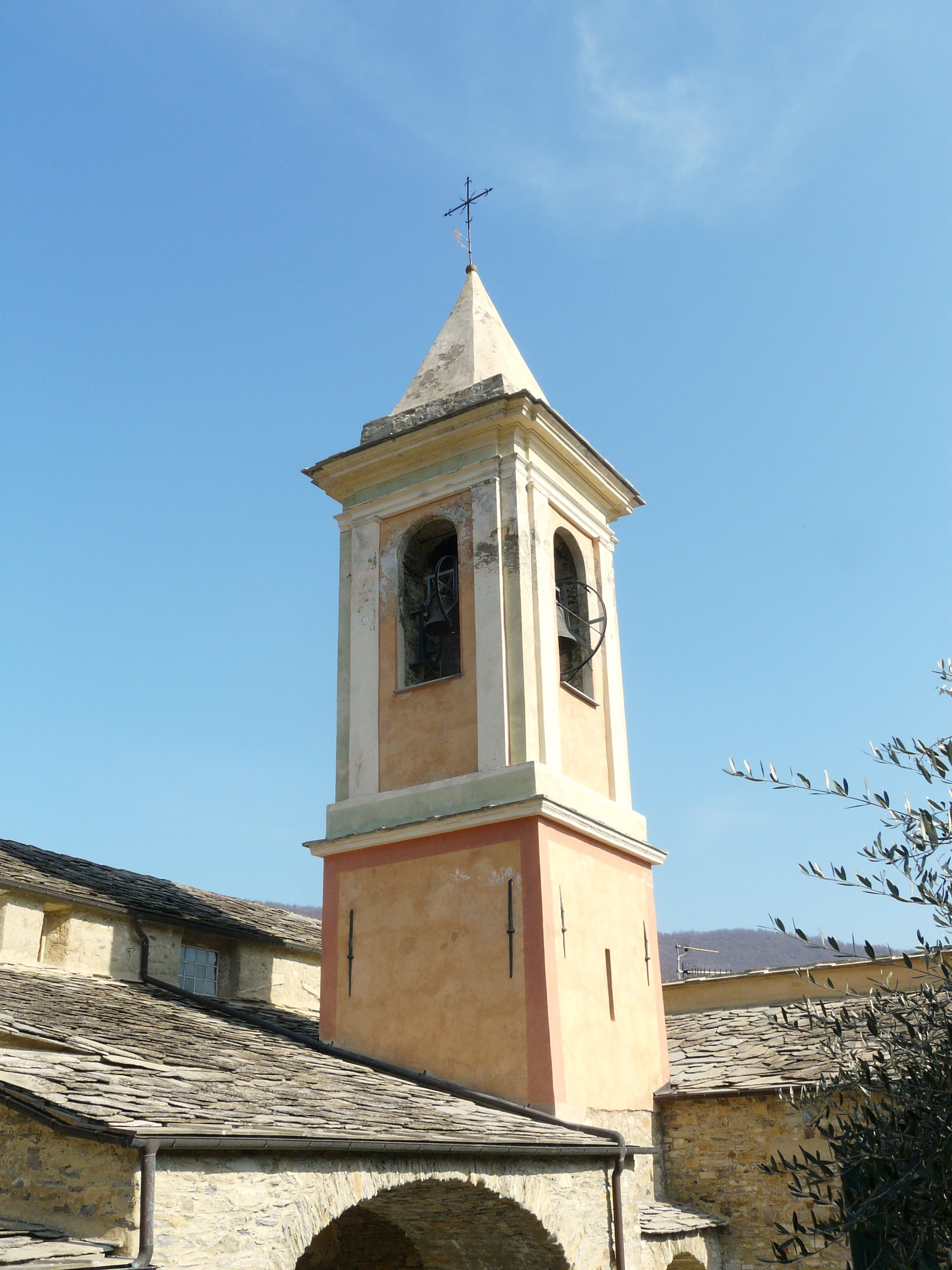 Chiesa dei Santi Nazario e Celso, Borgomaro, Liguria, Italia